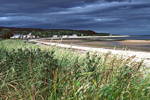 Golspie